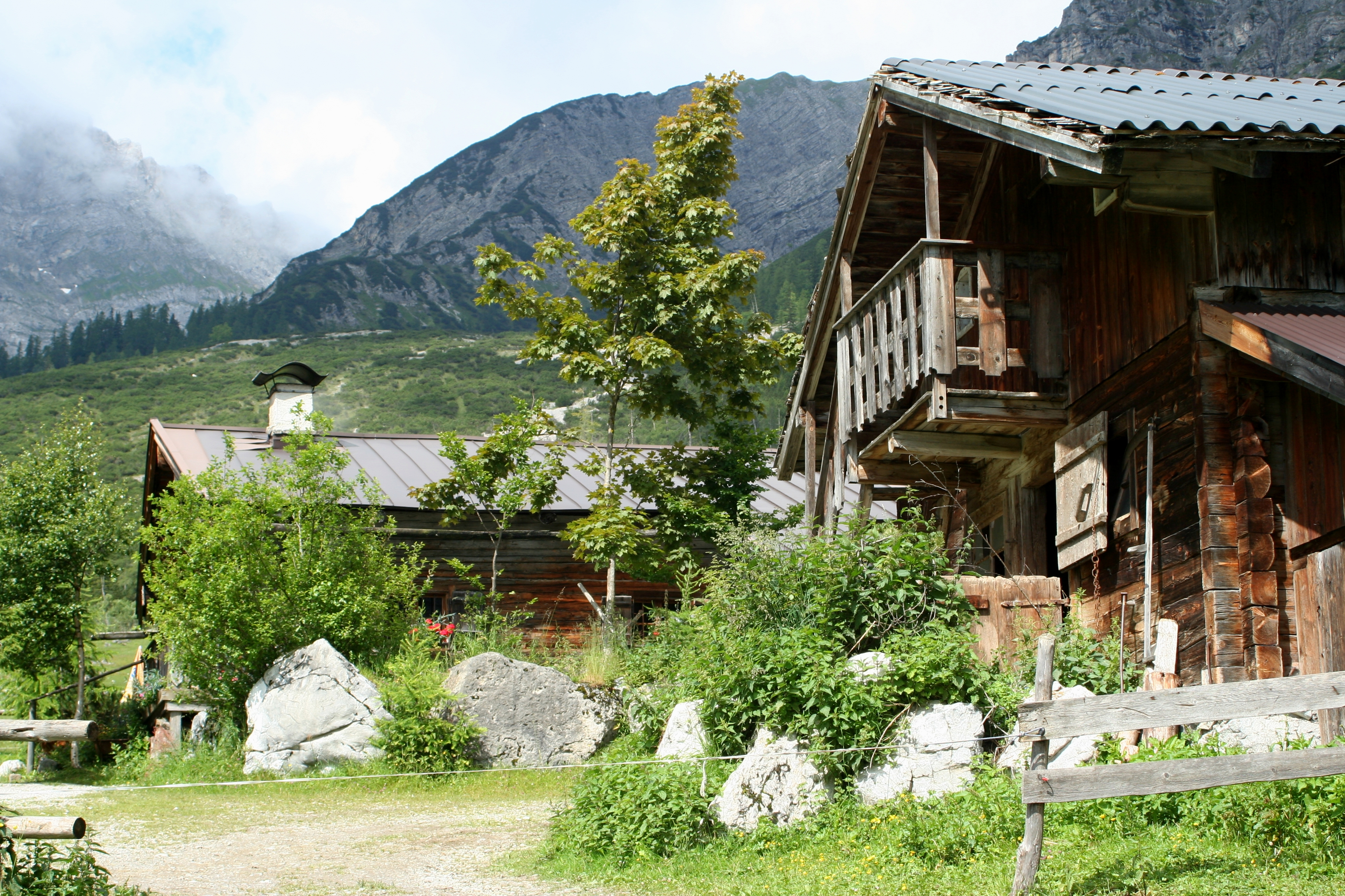 Stallenalm im Stallental, Karwendel